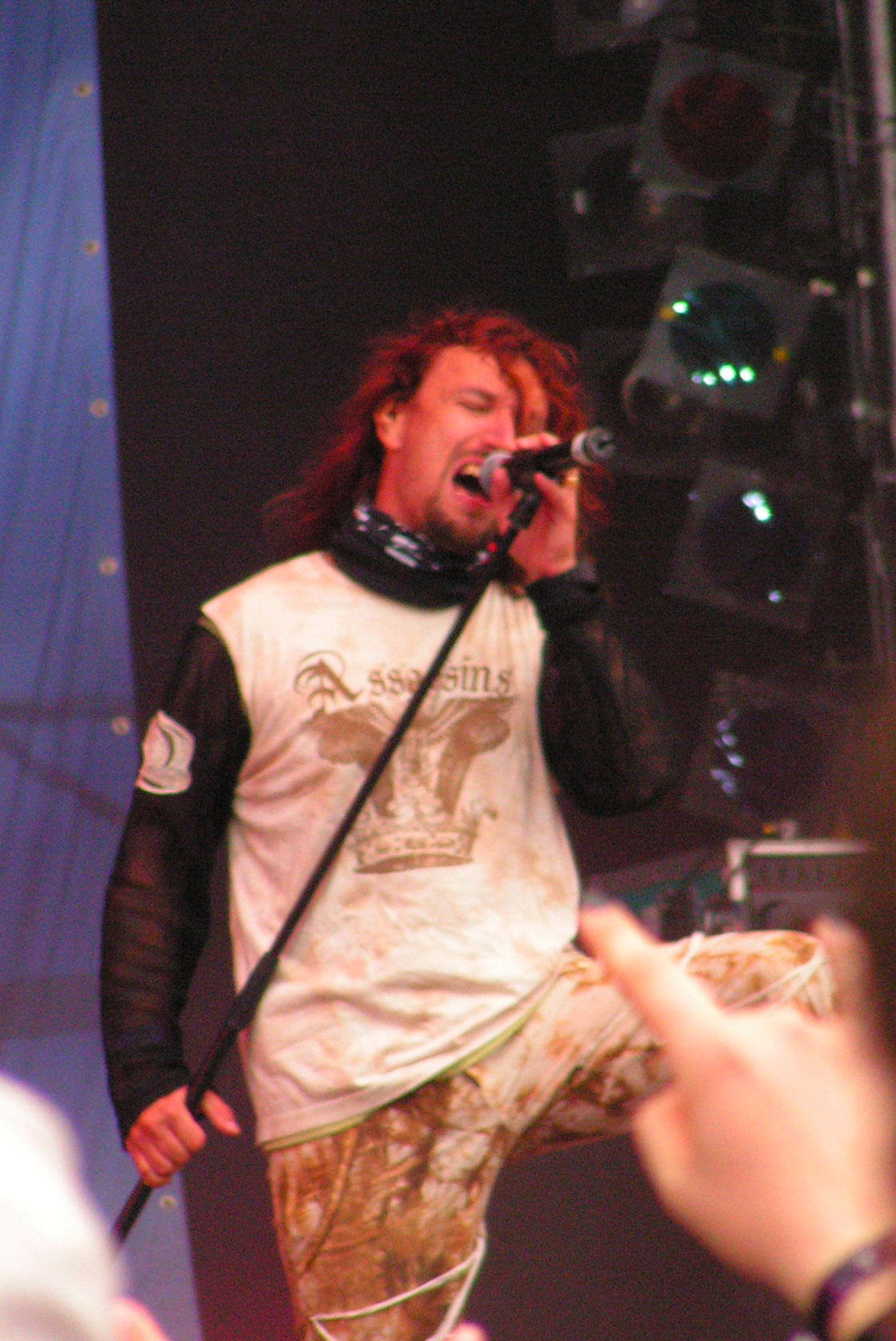 Sonata Arctica in concerto